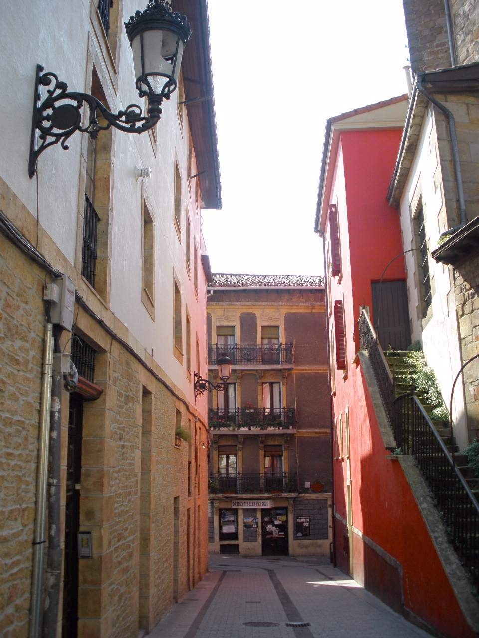 Ordizia, Guipúzcoa